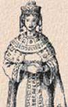 Zeichnung von Richenza von Northeim, Kaiserin des Heiligen Römischen Reichs Deutscher Nation.